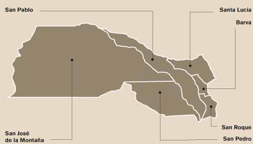 Mapa de los distritos del cantón de Barva, provincia de Heredia, Costa Rica.